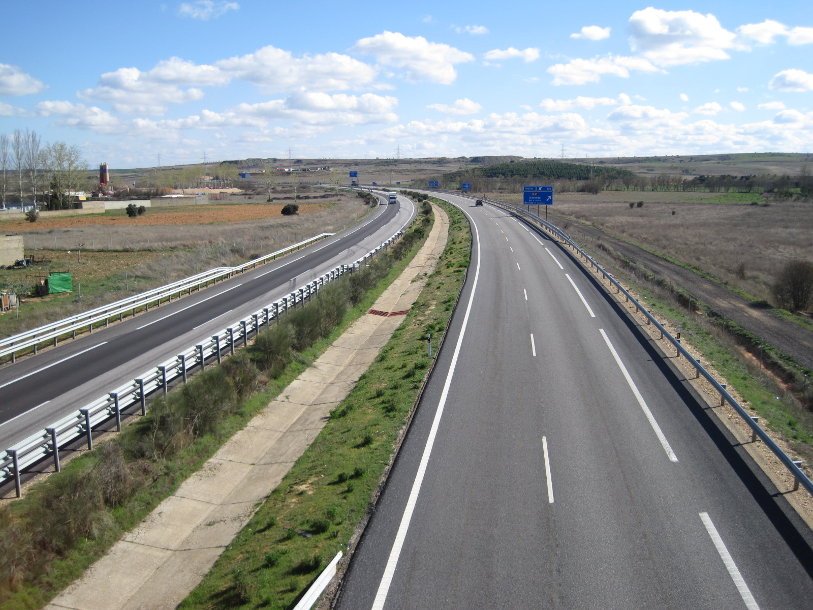 Autovía A-6 a su paso por Astorga (León, España).